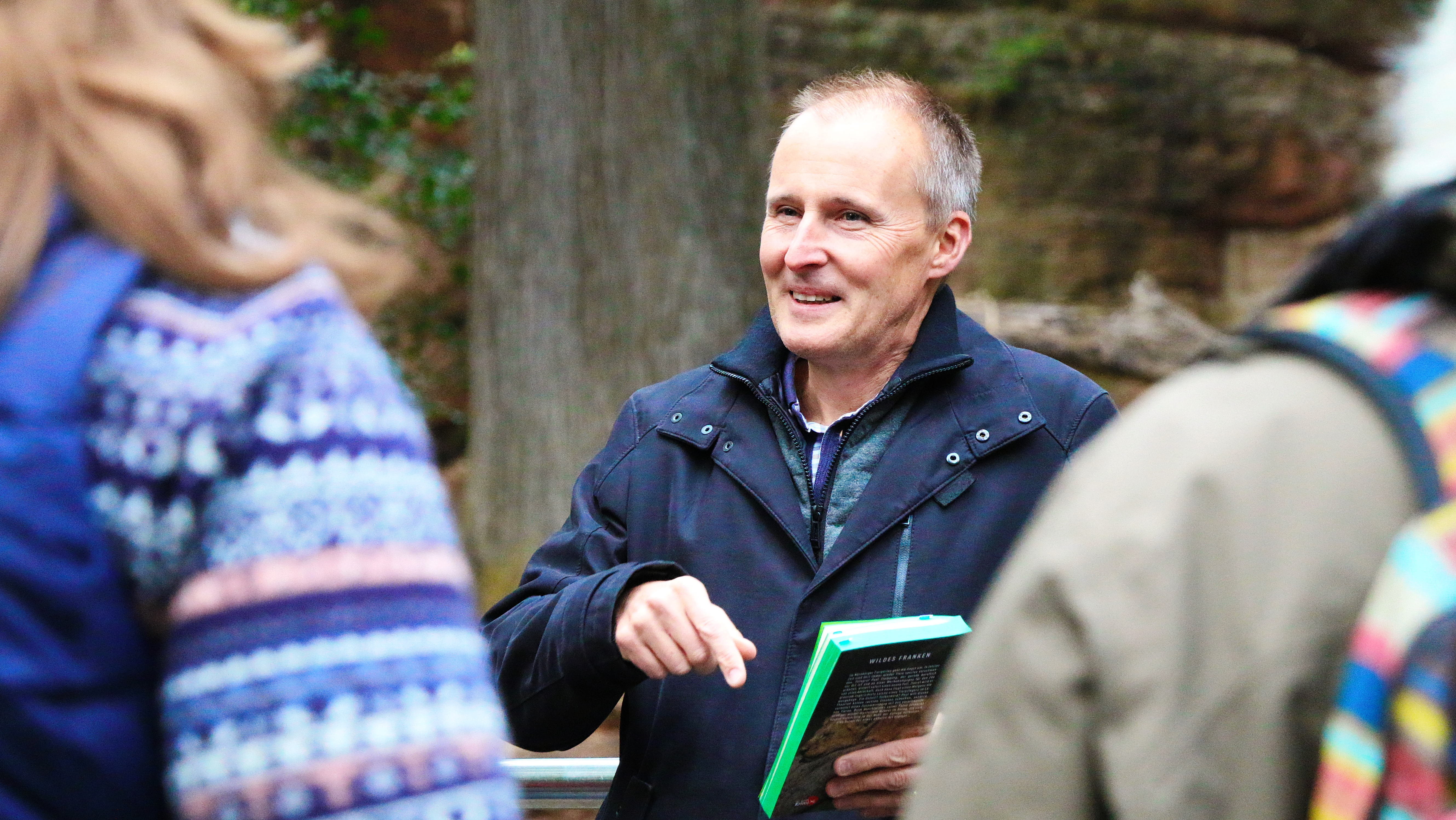 Jan Beinßen liest aus "Tod im Tiergarten" vor dem Löwengehege